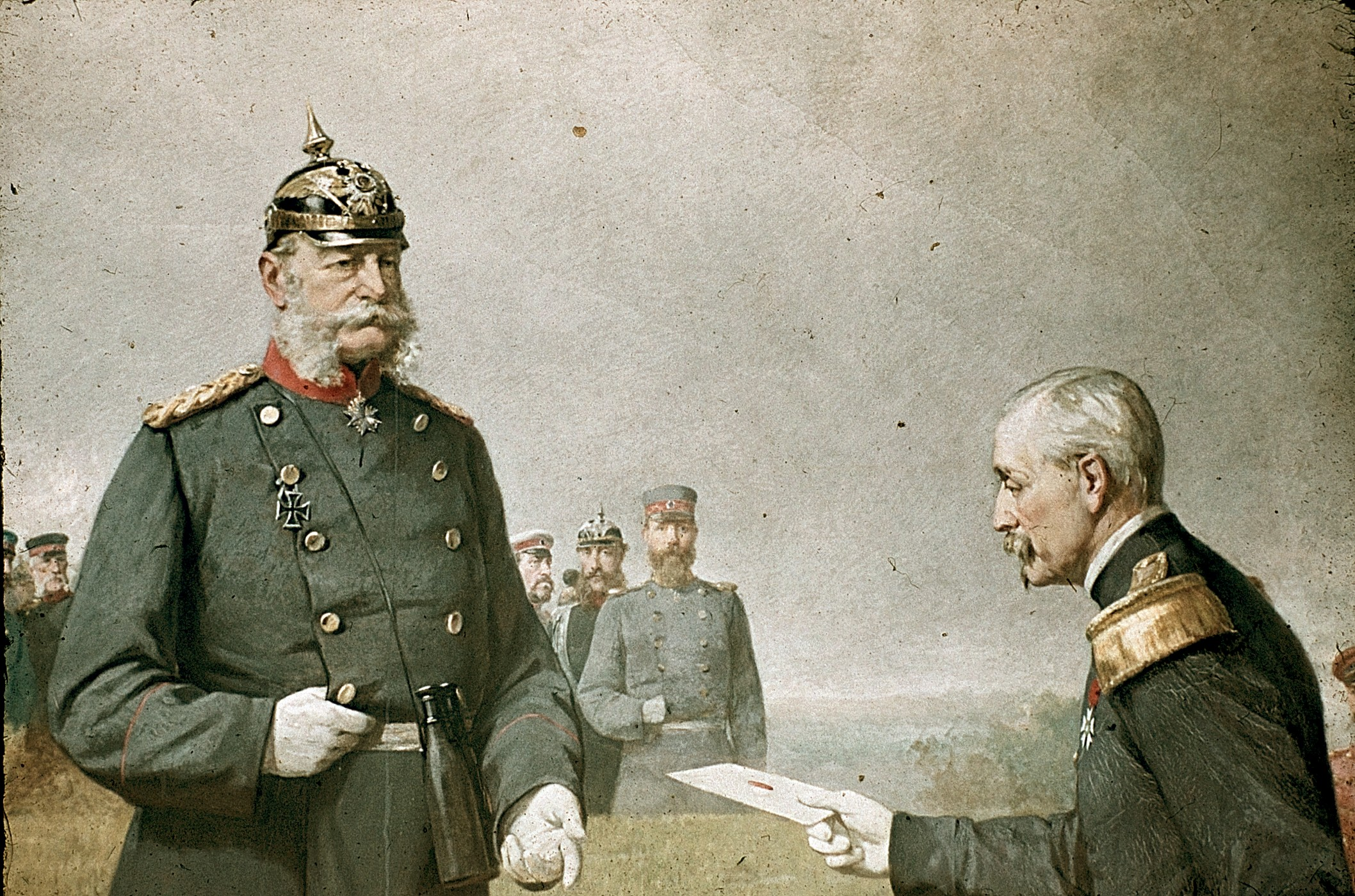 General Reille überbringt König Wilhelm I. auf dem Schlachtfelde von Sedan das Schreiben Kaiser Napoleons. Wandgemälde von Carl Steffeck (1884) für die ehemalige Ruhmeshalle Berlin. Detail. Zerstörung nach Bombentreffer um 1944